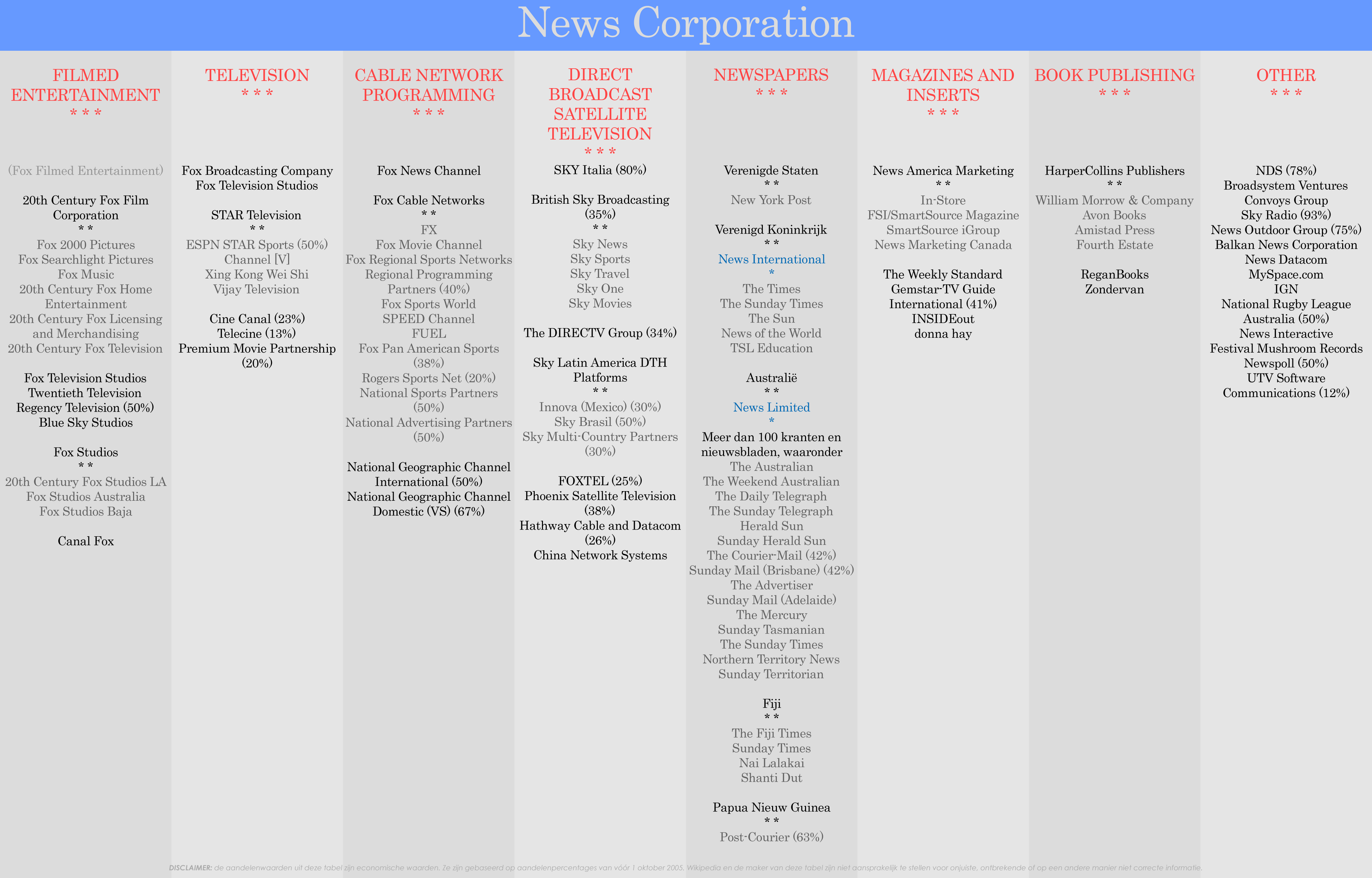 Zelfgemaakt op basis van her en der gevonden informatie (maar altijd gecontroleerd op basis van jaarverslagen van News Corporation zelf)